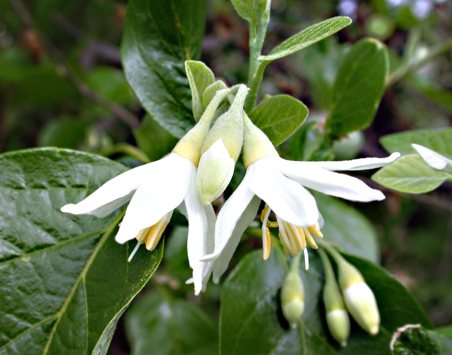 Fiori di Styrax Comune di Marcellina (Rm) nel territorio del Parco dei Monti Lucretili